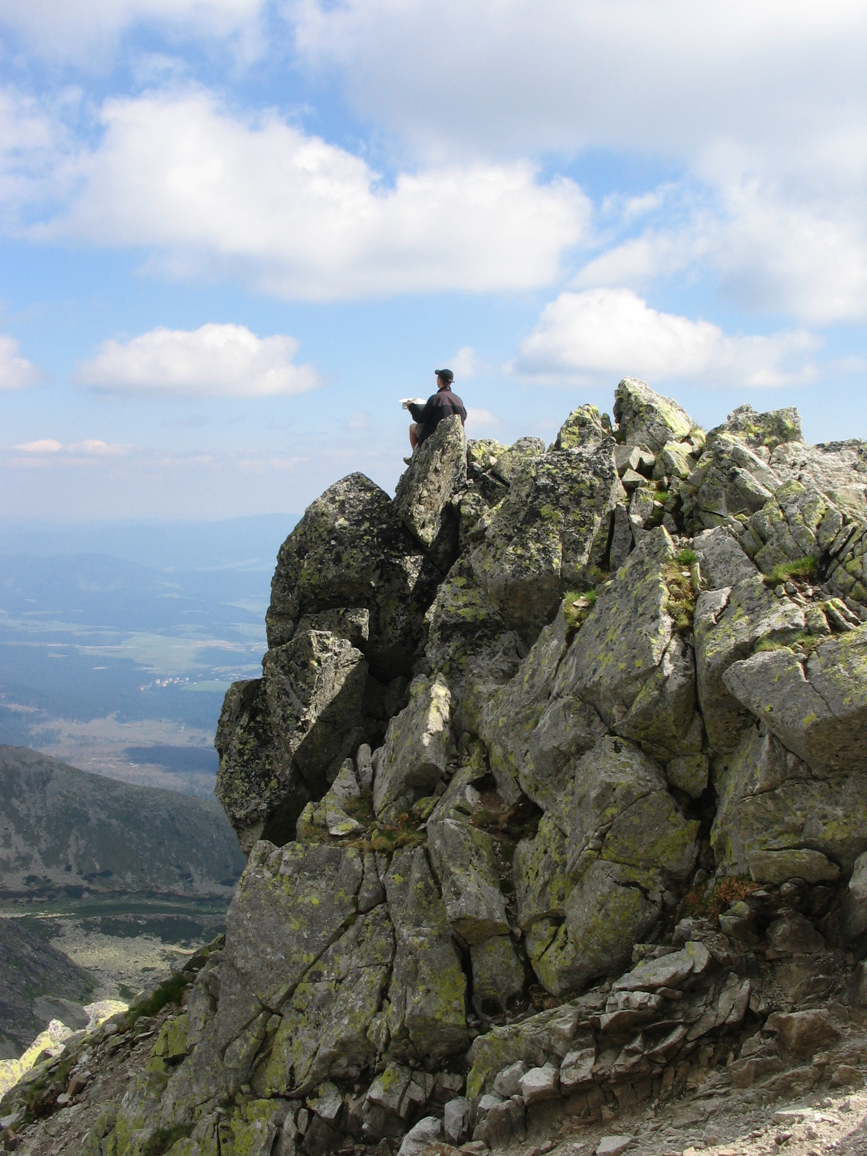 Maly Krivan Mały Krywań Malý Kriváň